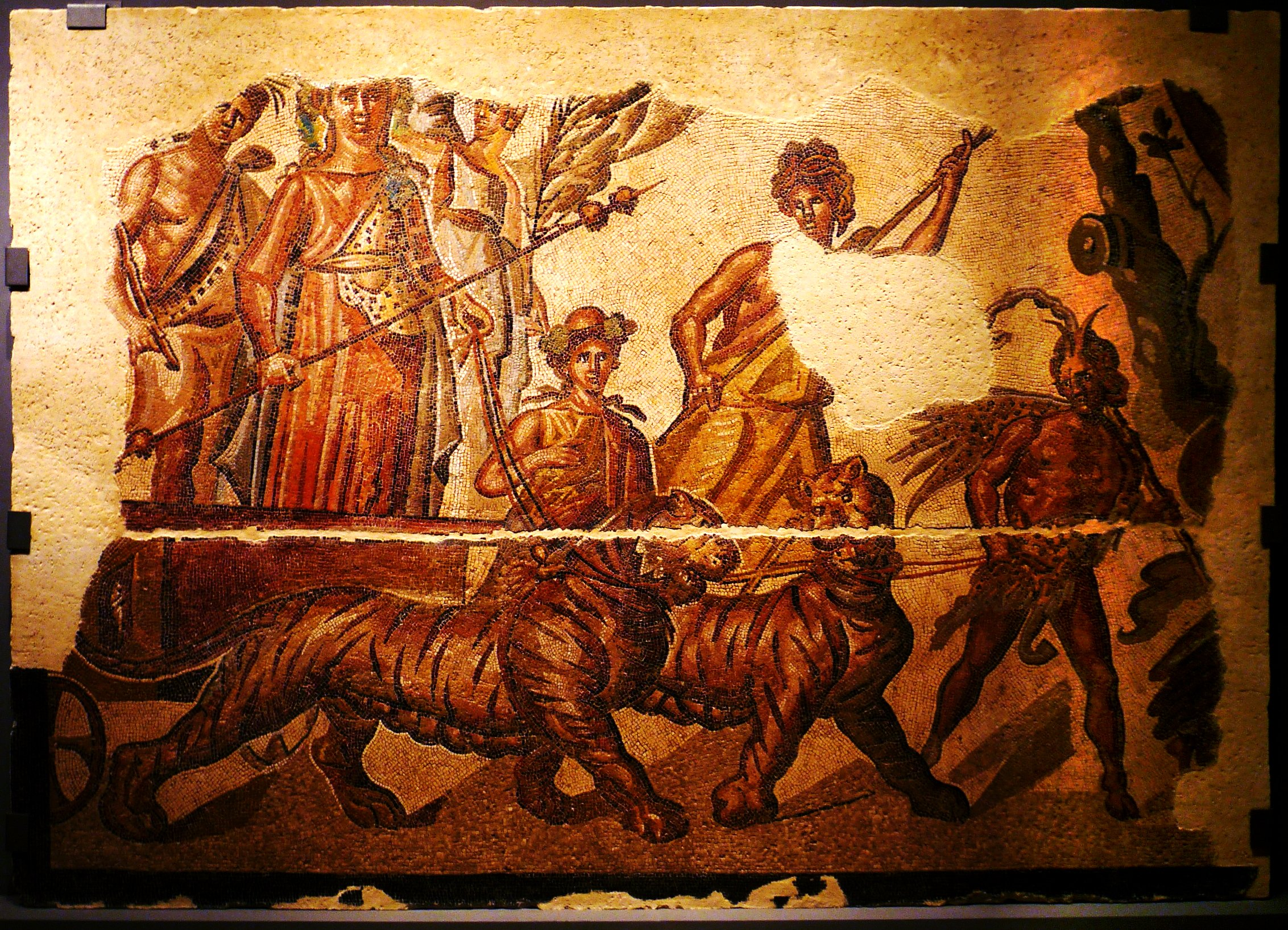 Zaragoza - Museo Provincial - Mosaico «Triunfo de Baco» s. II (prestado temporalmente por el Museo Arqueológico Nacional)